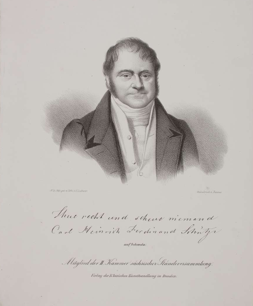 Gutsbesitzer auf Schweta b. Oschatz; Abgeordneter der Zweiten Kammer der sächs. Ständeversammlung 1833/34, 1778-1860